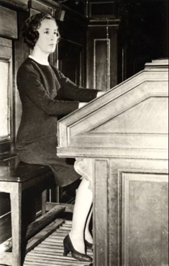 Demessieux